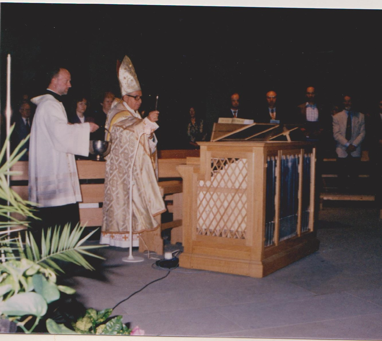 Bischof Dr. Nemesio Rivera Meza weiht am 25.09.1994 die Truhenorgel der ehemaligen Zisterzienserabtei Otterberg-Pfalz. Die Truhenorgel ist von der Firma Förster und Nicolaus aus Lich/Oberhessen. Ein baugleiches Instrument wurde für den Speyerer Dom angeschafft.